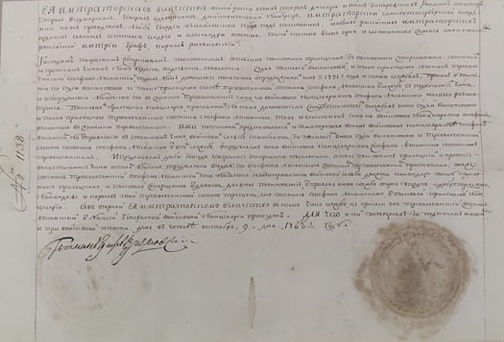 Універсал гетьмана Кирила Розумовського про присвоєння чину сотника Переволочанського Стефану Лукомському, 9 жовтня 1763 р.